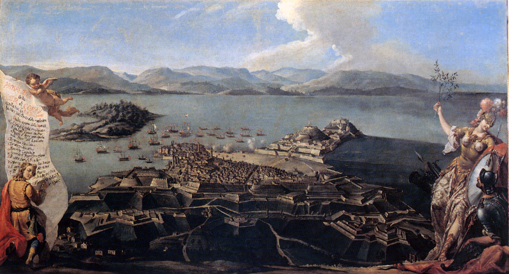 Παλιά πόλη της Κέρκυρας